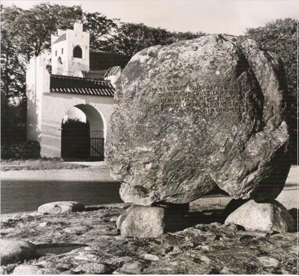 Mesingstenen ved Skanderborg, Danmark hentet til landsbyen Mesing i 1934 og placeret mellem kirken og forsamlingshuset - Sagnet fortæller at den kommer fra Illerup ÅdalMesing Kirke ses bag stenen